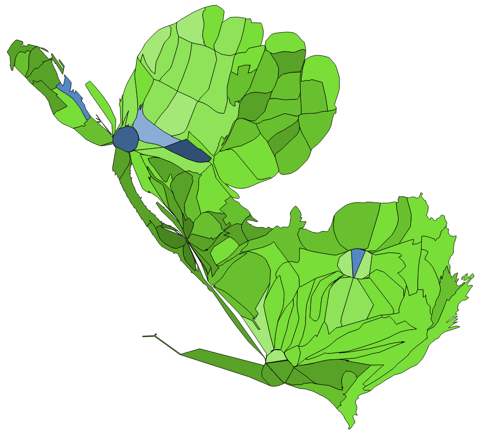 中文（台灣）: 顏色對照表